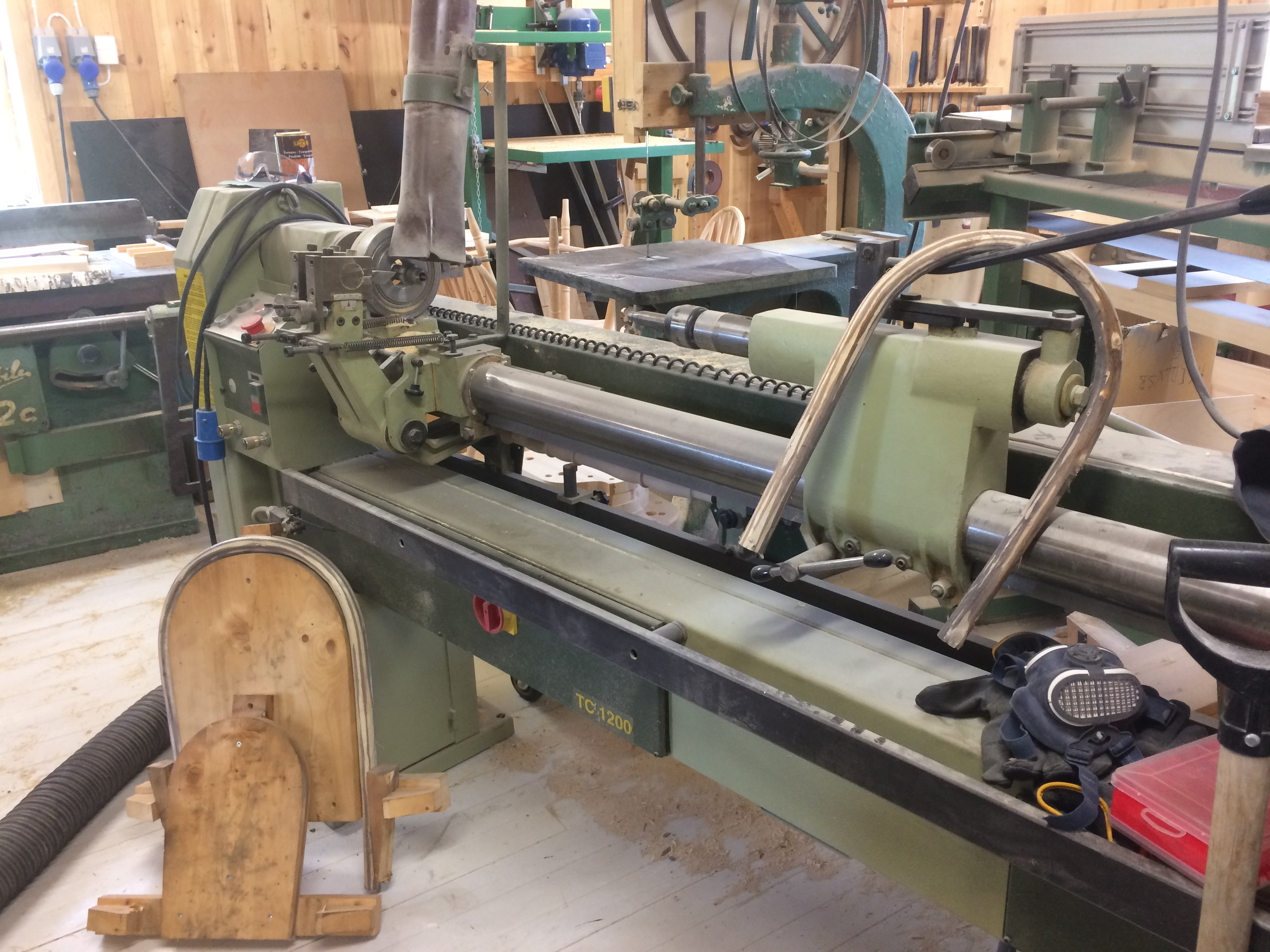 Dreiebenk, emner for ryggbuer til budalstoler og maler til disse. John Tovmos verksted (2016)